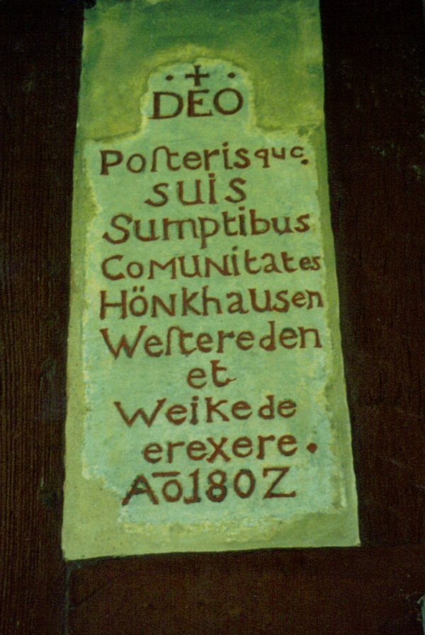 Inschrift zur 1802 gegründeten Knabenschule, angebracht außen an der alten Schule in Hoinkhausen, Rüthen, Kreis Soest – zu lesen sind die alten Formen der Ortsnamen Hoinkhausen (Hönkhausen), Westereiden (Westereden) und Weickede (Weikede)